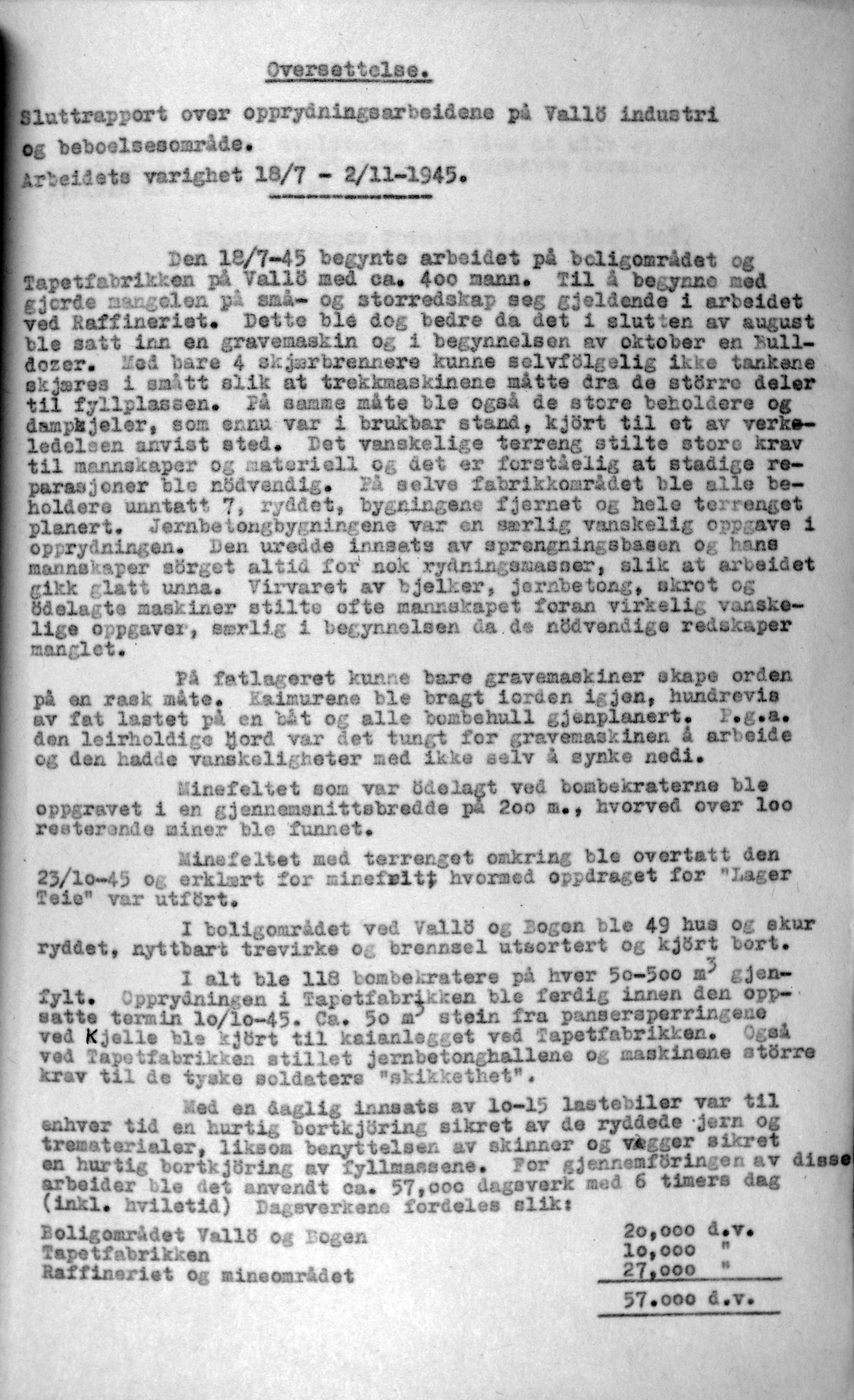 Angrepet på Vallø, før- og etterbilder